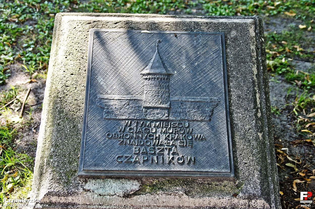 Tu stała kiedyś baszta czapników.